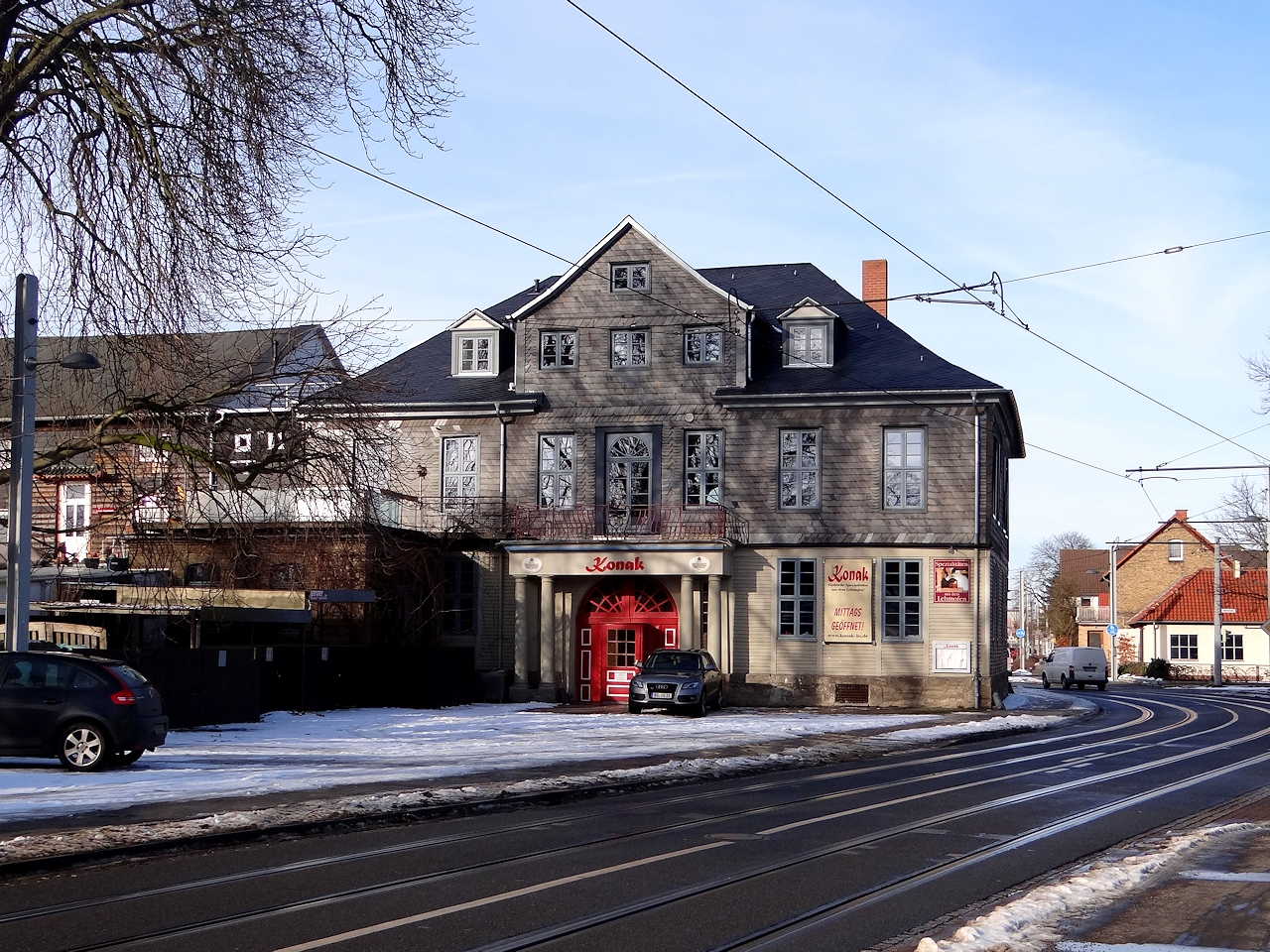 Großes Weghaus nach der Renovierung, Januar 2014 von Süden.